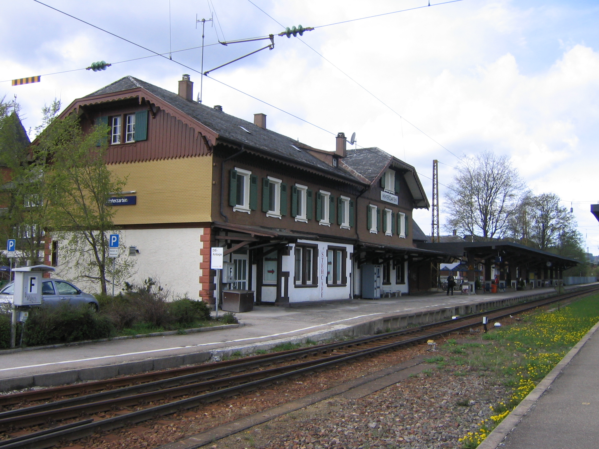 Bahnhof Hinterzarten von Gleis 2 aus